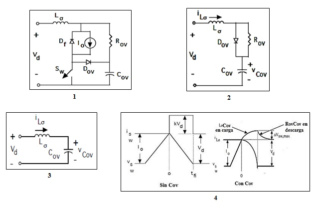 Sobre